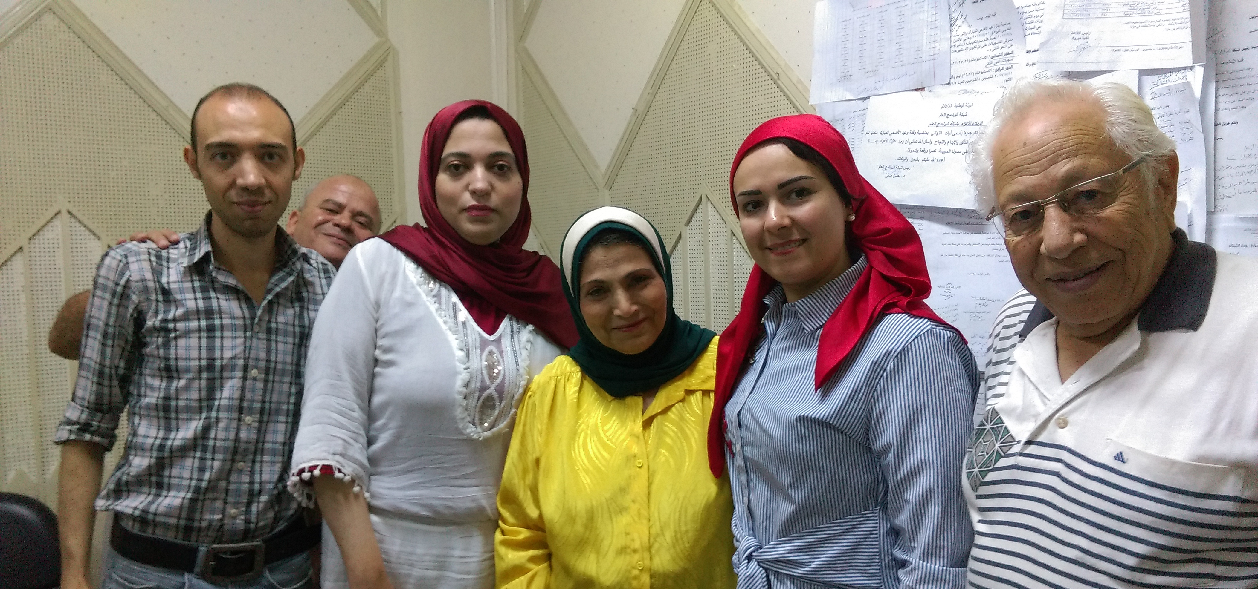 الفنانة فاطمة عيد مع فريق عمل البرنامج العام